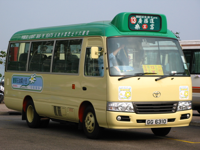 Toyota Coaster Hong Kong Minibus.